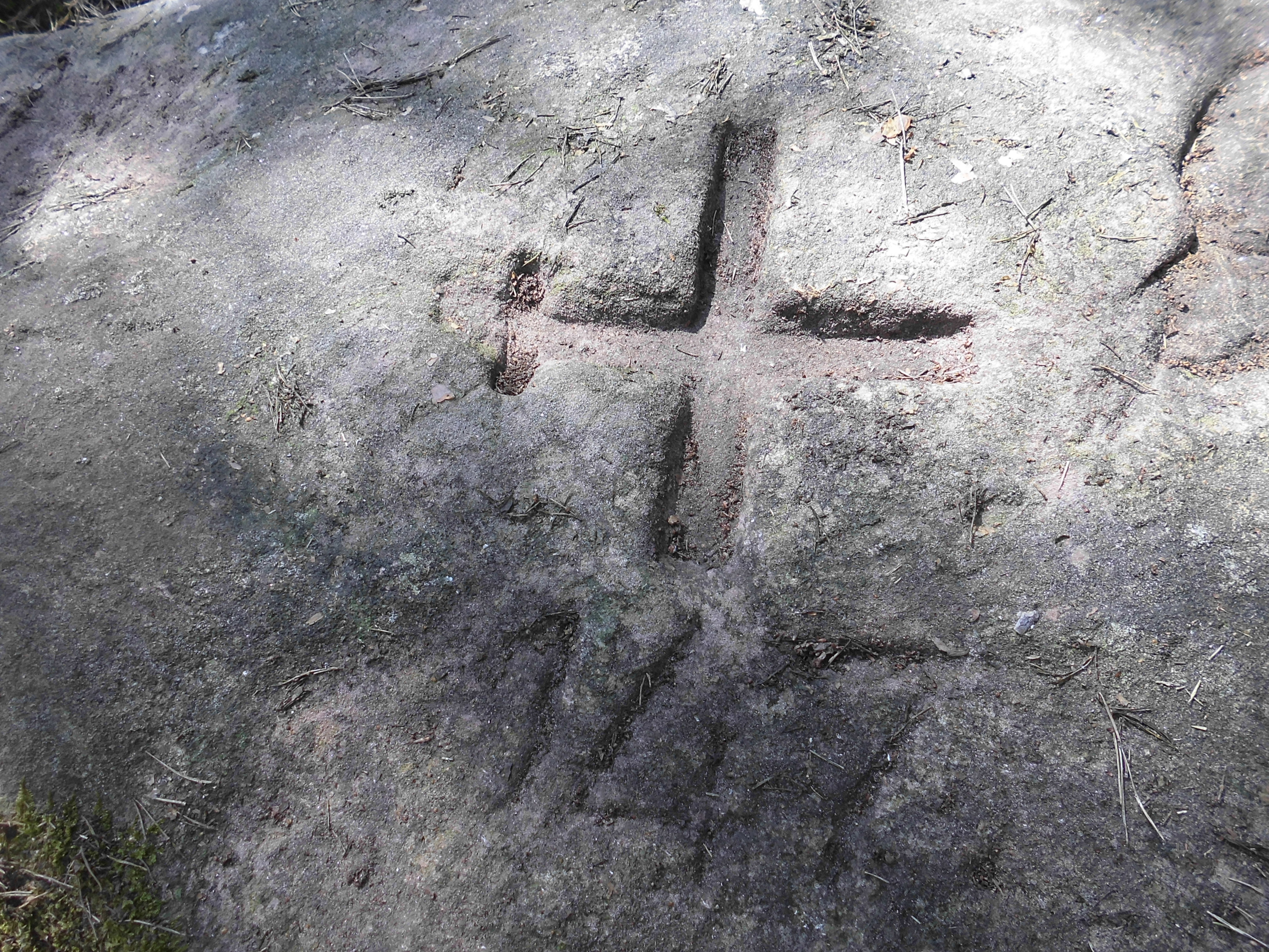 Der Christophel-Schuh, ein Loogfels an der Nordgrenze der pfälzischen Stadt Deidesheim zu Wachenheim